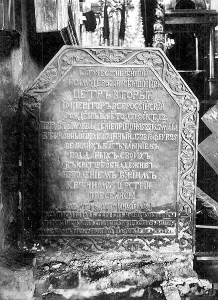 Архангельский собор. «Кирпичное надгробие с каменной плитою над склепом Императора Петра II, находящееся у южной стены Северо-восточного столба». Фотография К.А.Фишера. 1905 г. Из коллекций Музея архитектуры им. А.В.Щусева. Инв. номер КПоф 4866-01, 02.